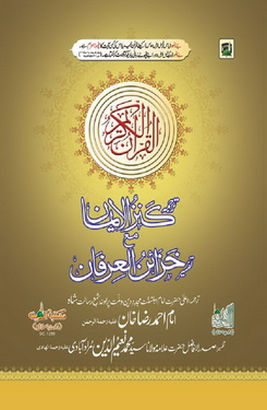 Kanzul iman book urdu title